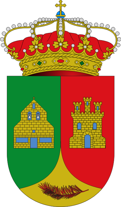 Escudo de San Martín de las Ollas